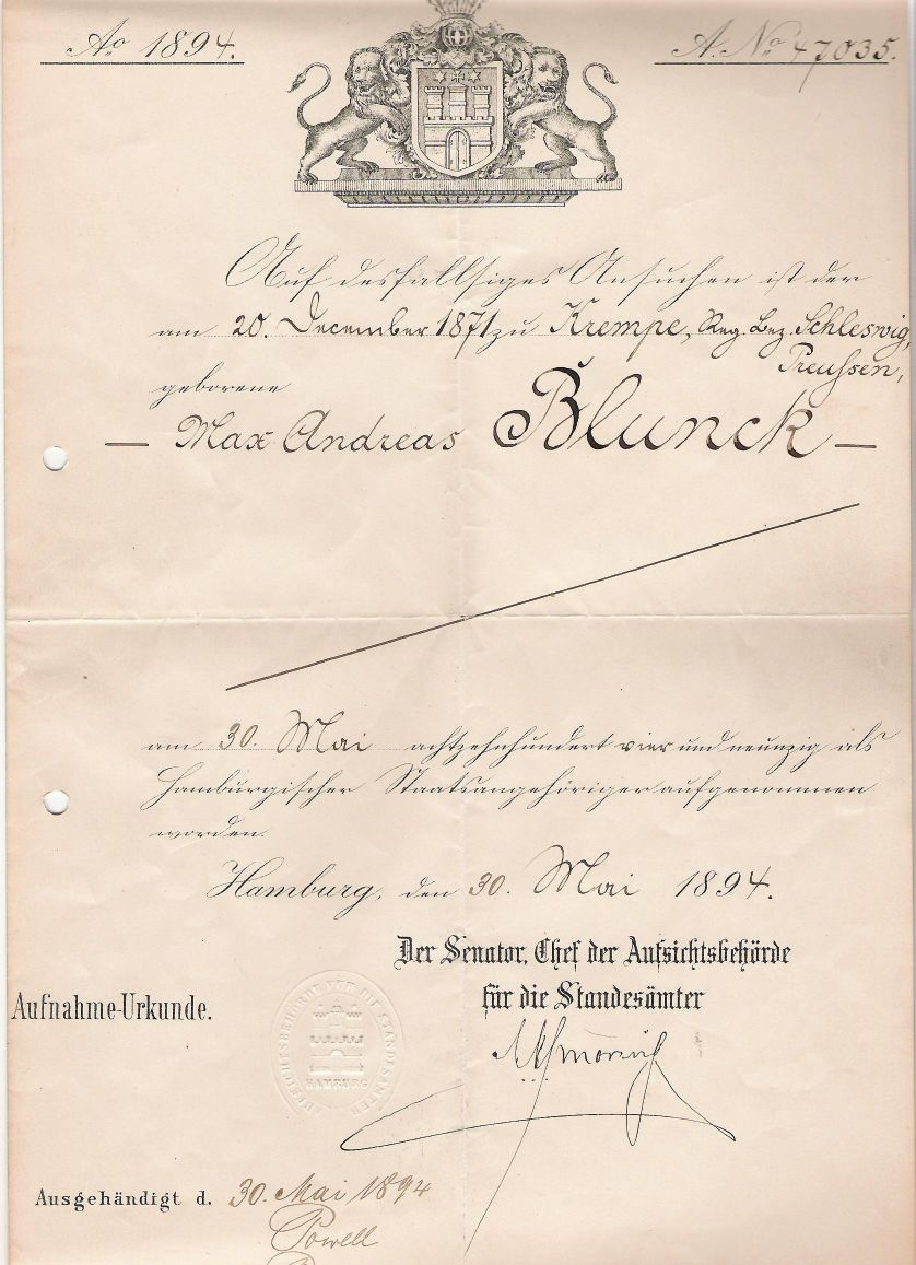 Aufnahmeurkunde als Hamburgischer Staatsangehöriger für Andreas Blunck, Inhalt: Aufnahmeurkunde als Hamburgischer Staatsangehöriger Auf desfalliges Ansuchen ist der am 20.Dezember 1871 zu Krempe, Regierungsbezirk Schleswig, Preußen, geborene - Max Andreas Blunck - am 30. Mai achtzehnhundertvierundneunzig als Hamburgischer Staatsangehöriger aufgenommen worden.